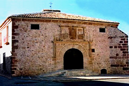 Pósito de Campo de Criptana Pósito-museo en Campo de Criptana (Ciudad Real, España) Fotografía tomada en junio de 2004, con cámara digital. Autor, Lourdes Cardenal.